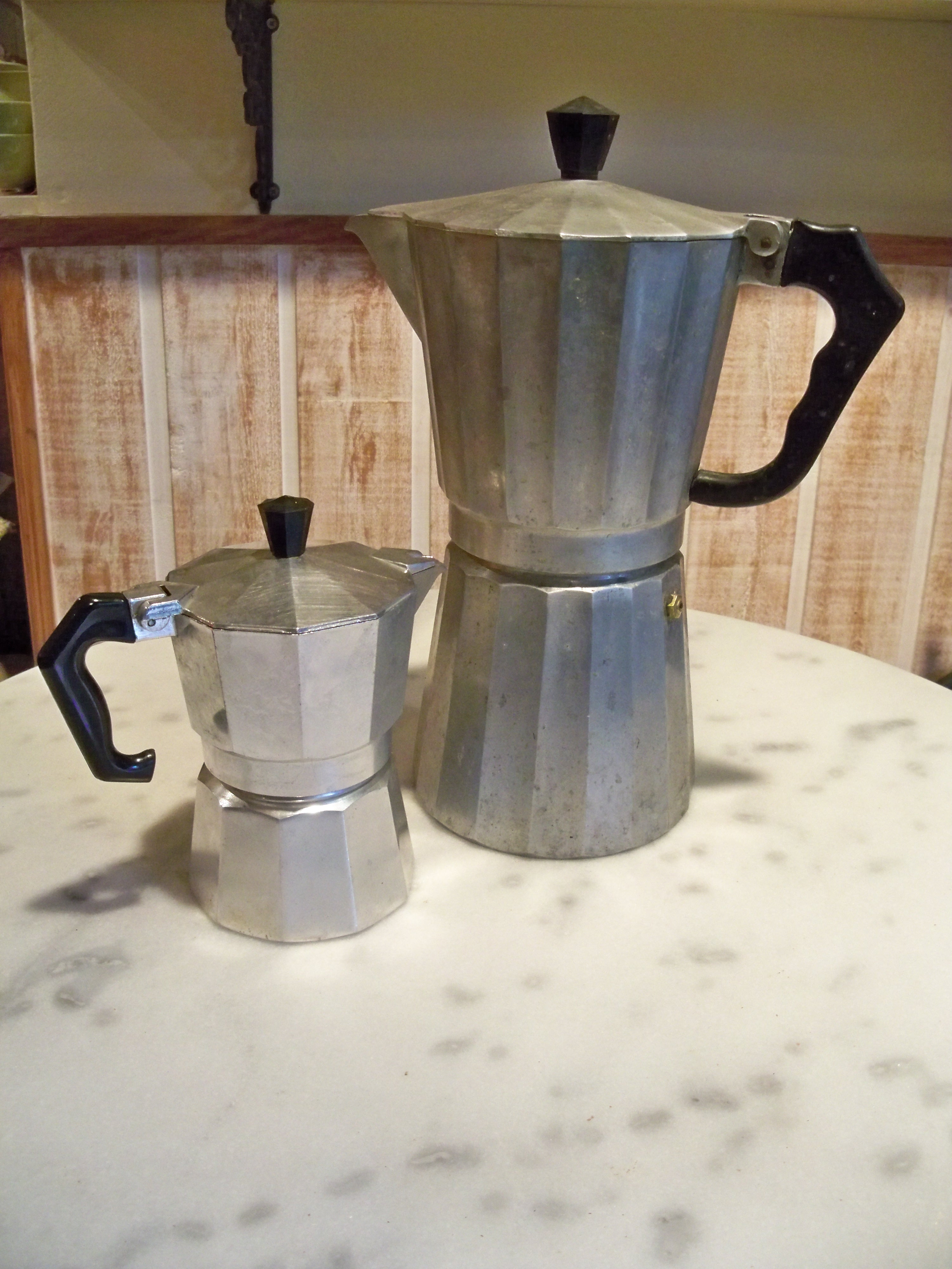 Cafetière